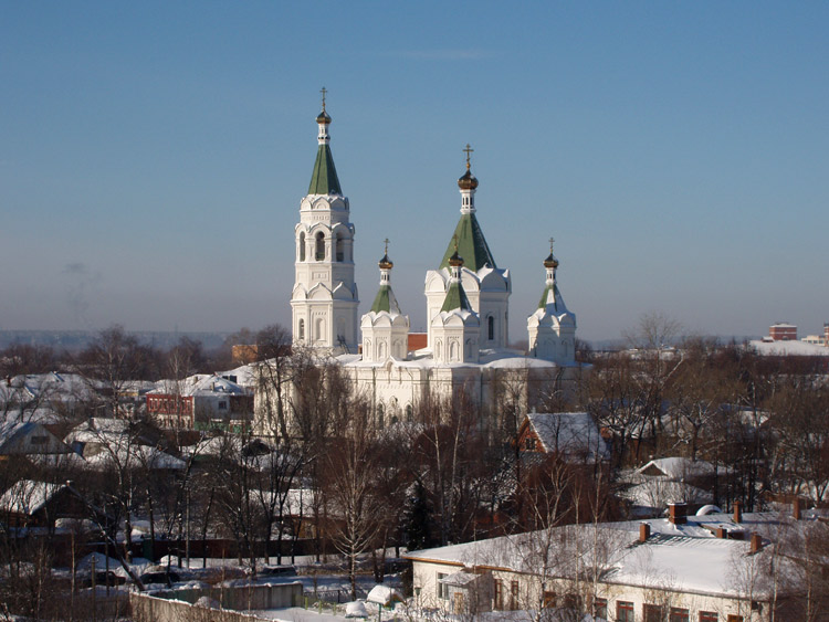 Соборный храм Александра Невского в Егорьевске (РПЦ)